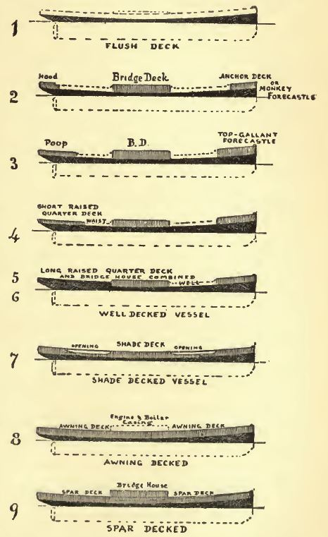 סוגי סיפונים באוניות